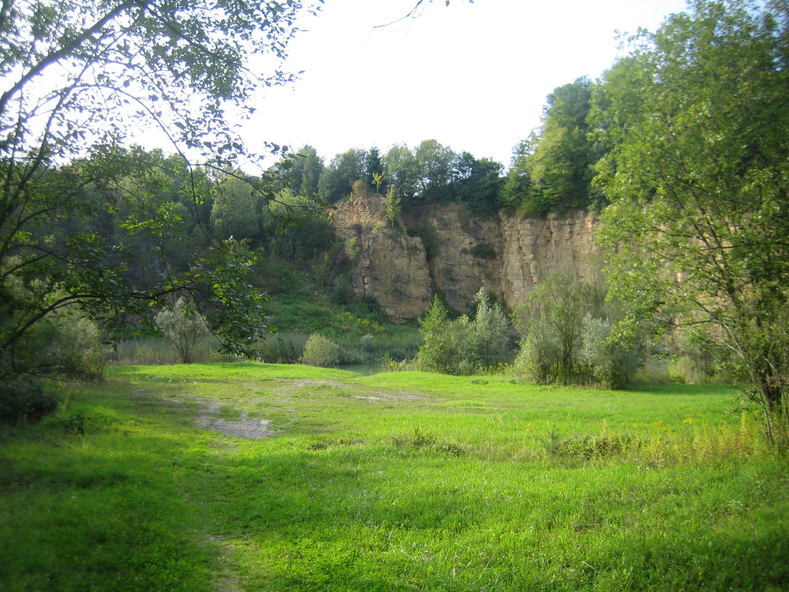 Eschelbronn, Steinbruch im Kallenberg